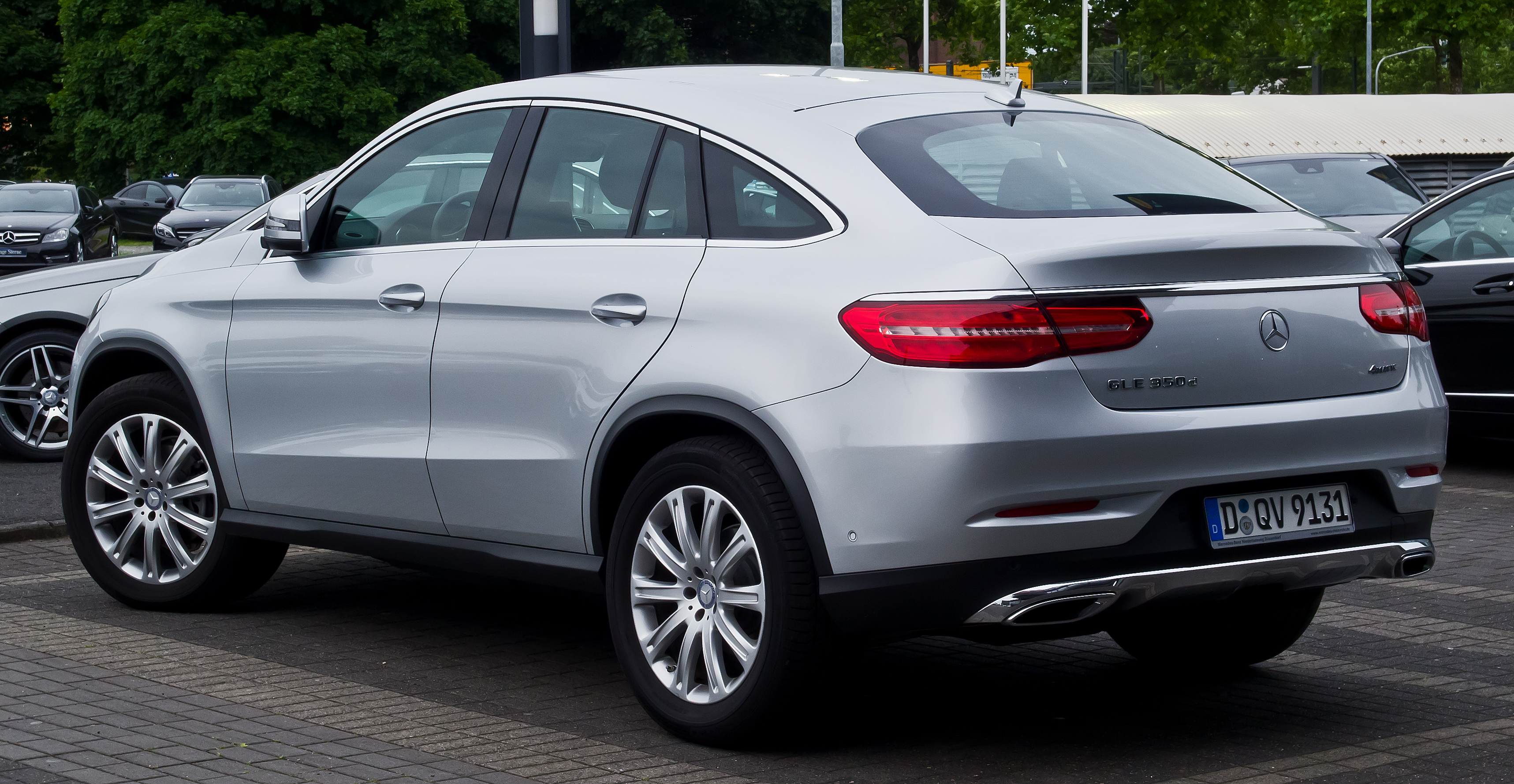 Mercedes-Benz GLE 350 d 4MATIC Coupé (C 292)